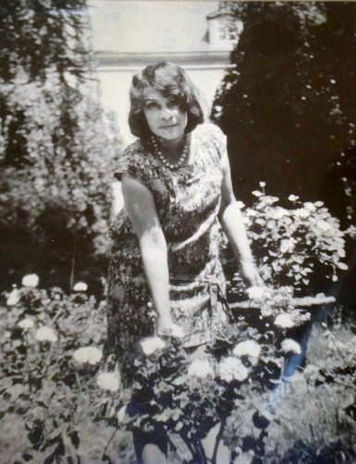 Photographie d'Aurore Sand dans le jardin, devant la maison de Nohant. Aurore, Jeanne Claudine Dudevant, est née à Nohant-Vic le 10 janvier 1866 et meurt à Nohant-Vic, le 15 septembre 1961 à l'âge de 95 ans. Elle est la fille de Maurice Sand et de Lina Calametta, et la petite-fille de la romancière George Sand. Aurore Dudevant est l'épouse de Frédéric Charles Lauth, artiste-peintre (1865-1922).